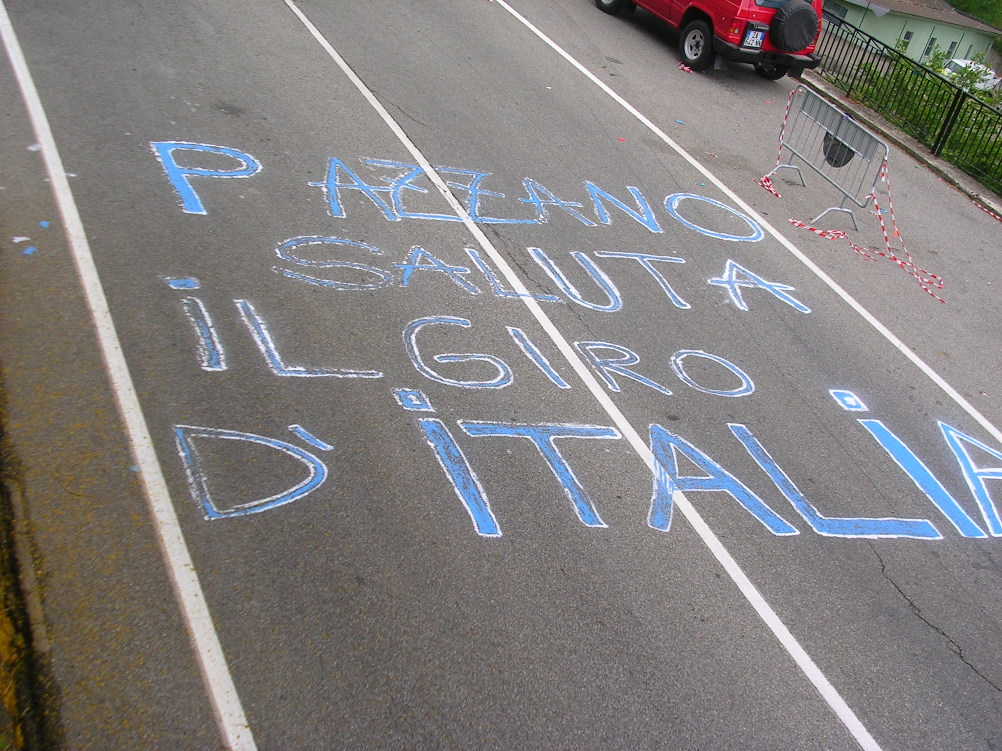 Pazzano_gira_d'italia